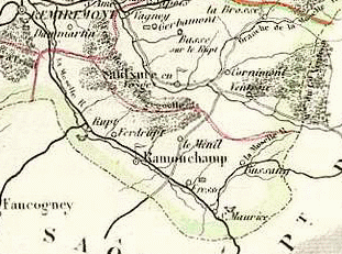 Le canton du Thillot en 1852 On constate l'absence de cette commune avant 1860. Extrait de la carte des Vosges disponible sur